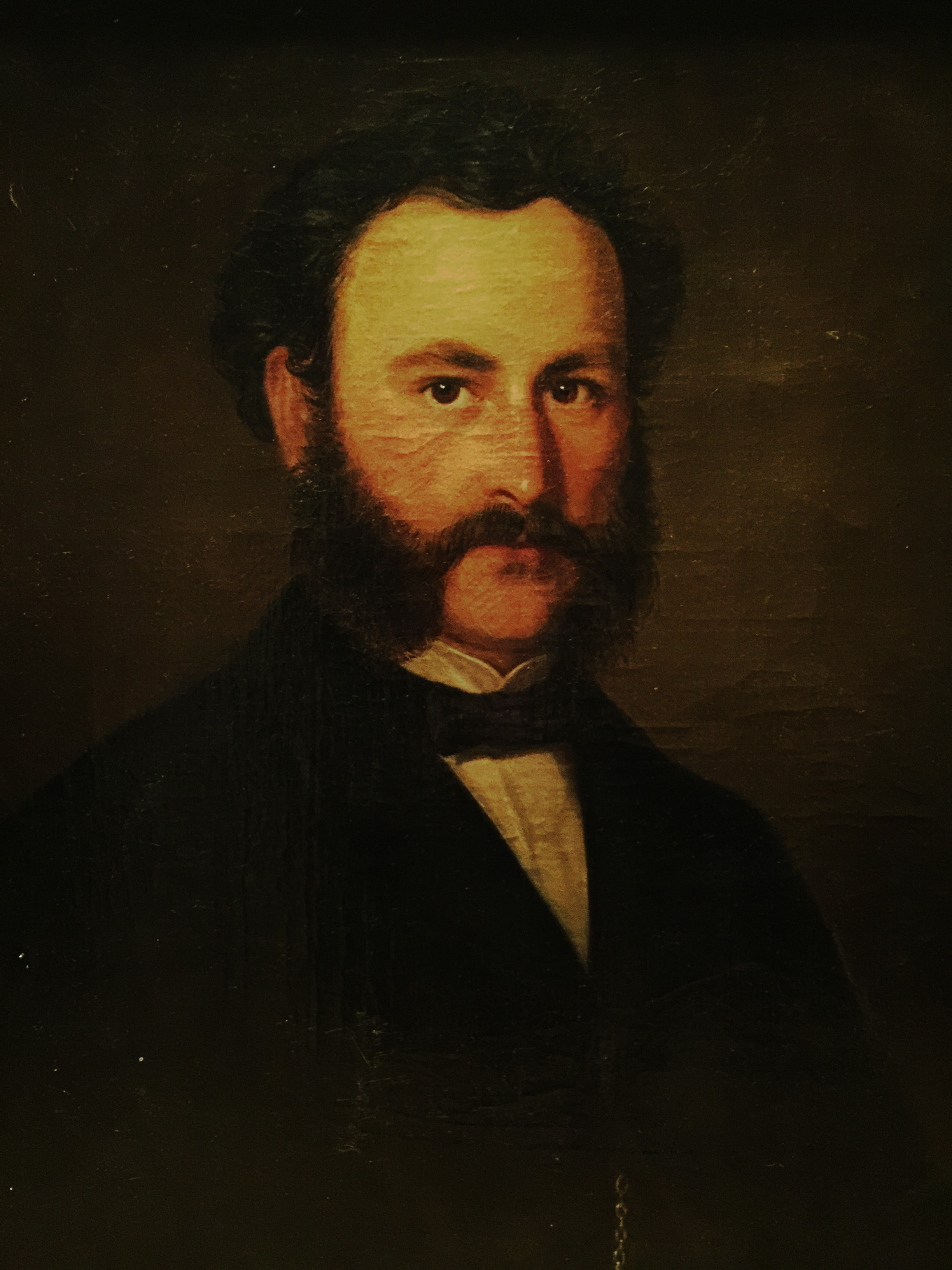 Porträt von Maximilian Eisenberger